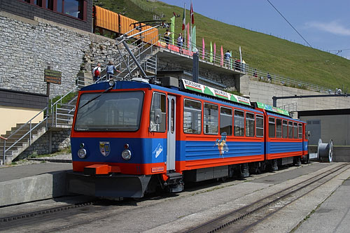 Die Zahnradbahn, die auf den Monte Generoso fährt